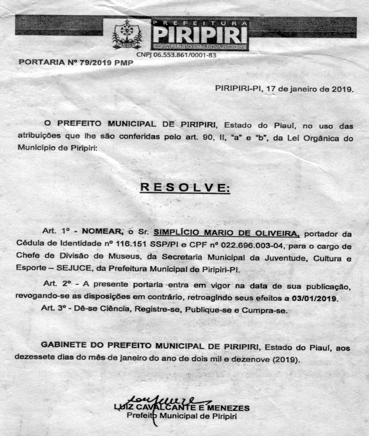 Portaria da nomeando pessoal em 2019.